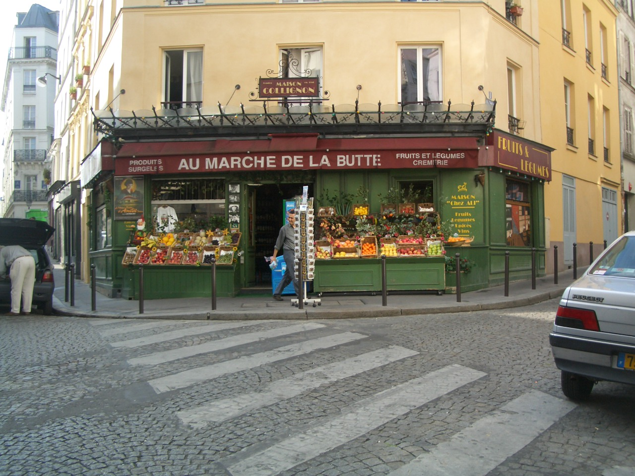 Gemueseladen aus dem Film Die fabelhafte Welt der Amelie